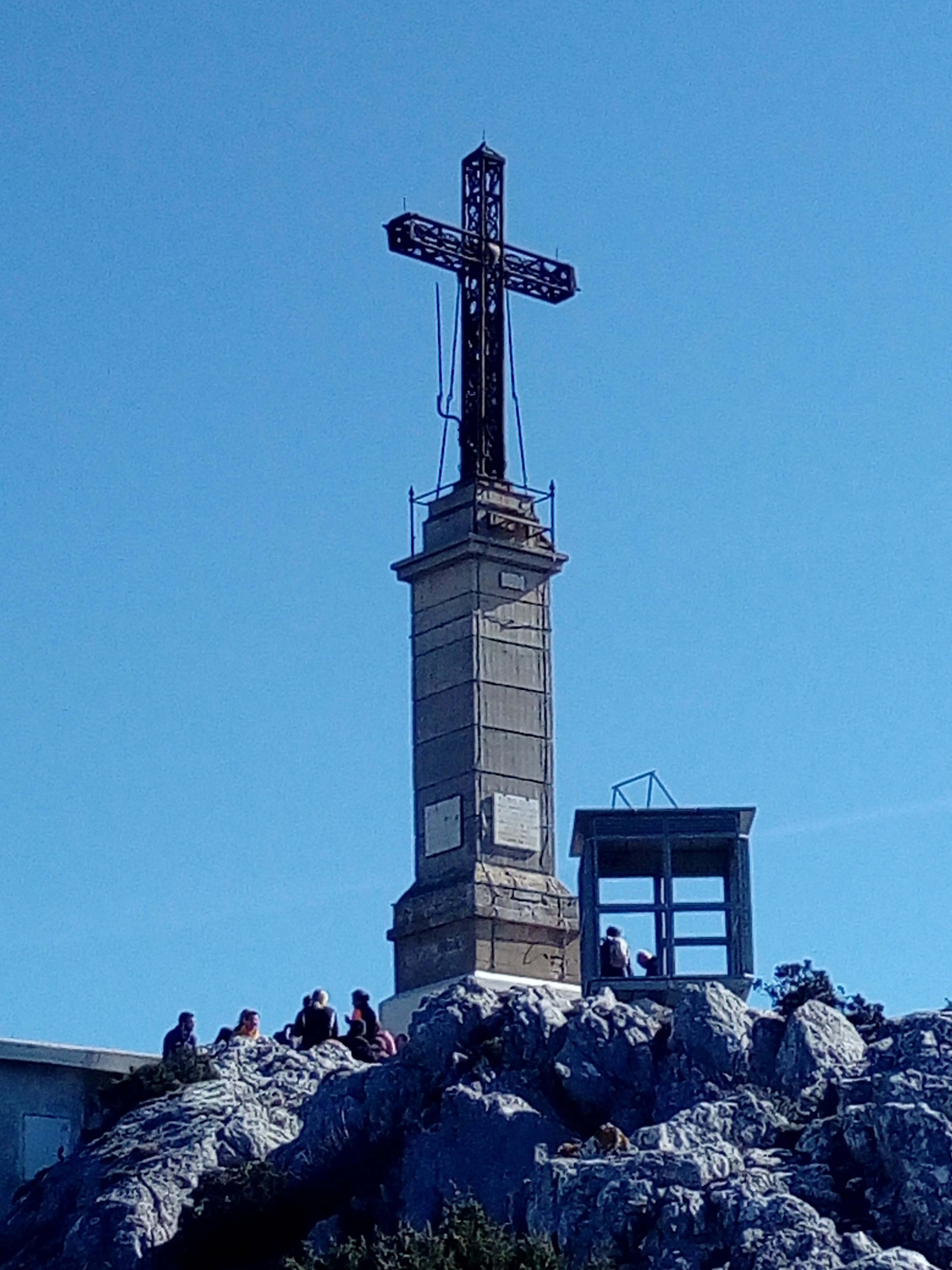 Croix de Provence en 2020.